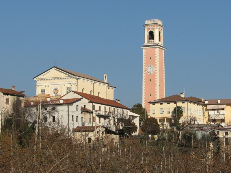 Parrocchia